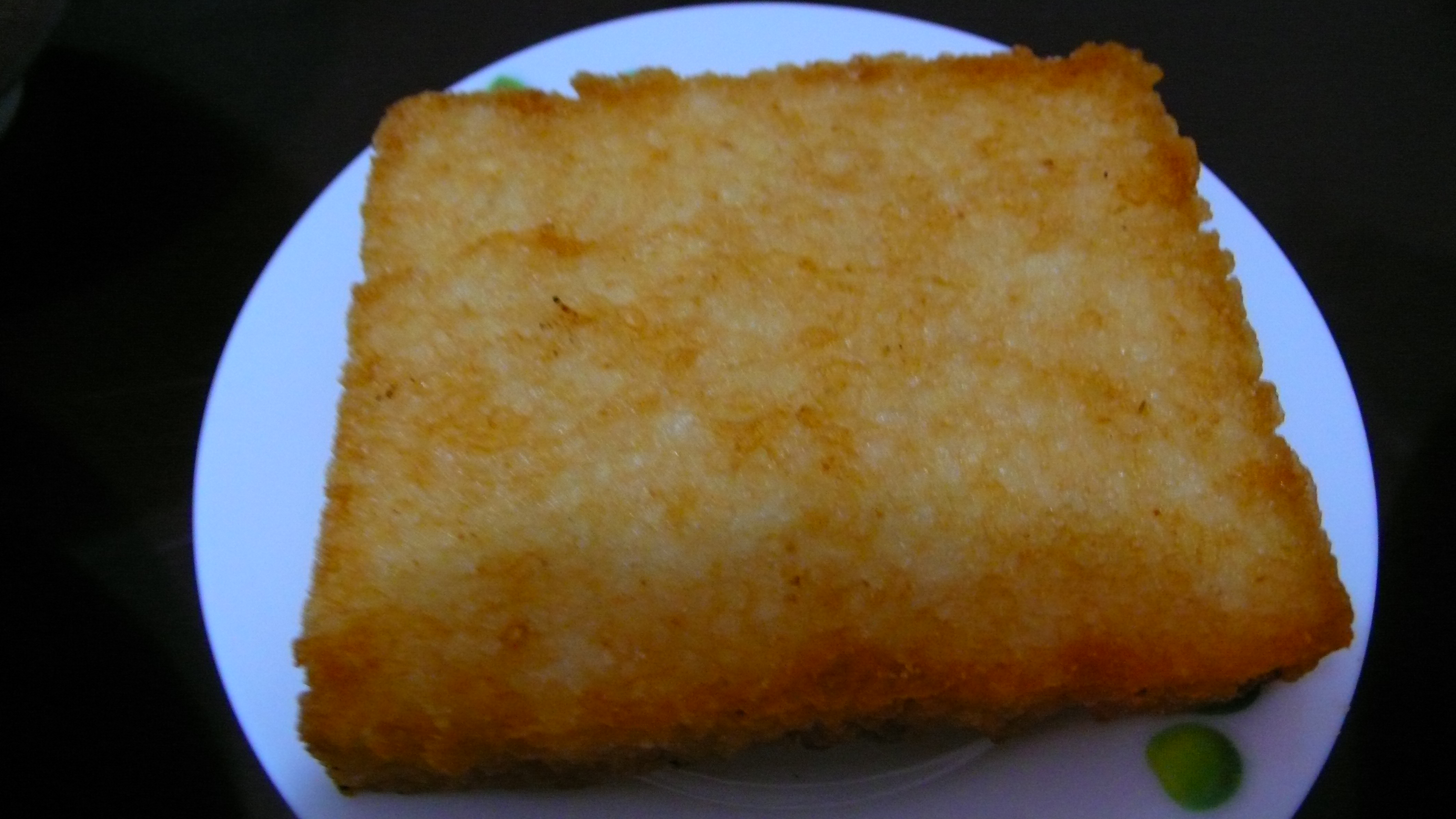 Cifangao